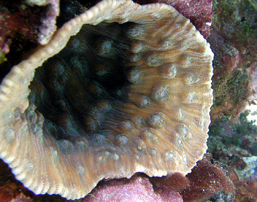 Mycedium elephantotus. Samoa